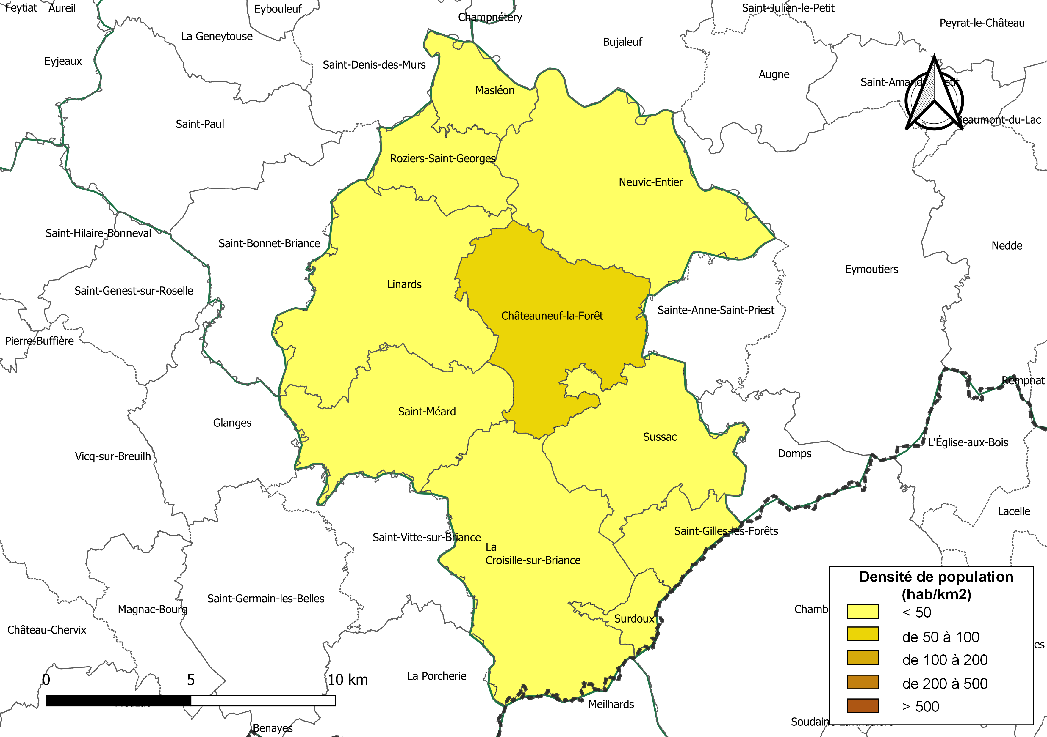 Carte des densités de population (millésimée 2016) des communes de la Communauté de communes Briance-Combade, département de la Haute-Vienne, France. Composition au 1er janvier 2019.